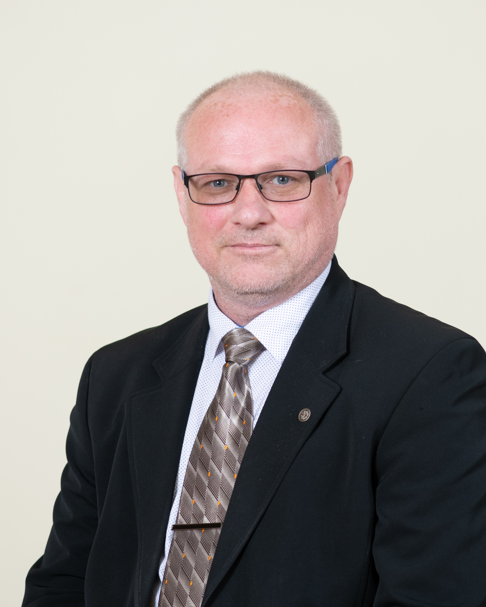 Paul Puustusmaa